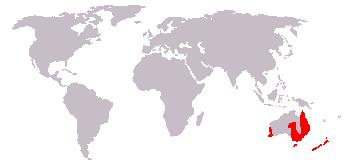 Bewerking afbeelding: Afbeelding_(kaart).JPG